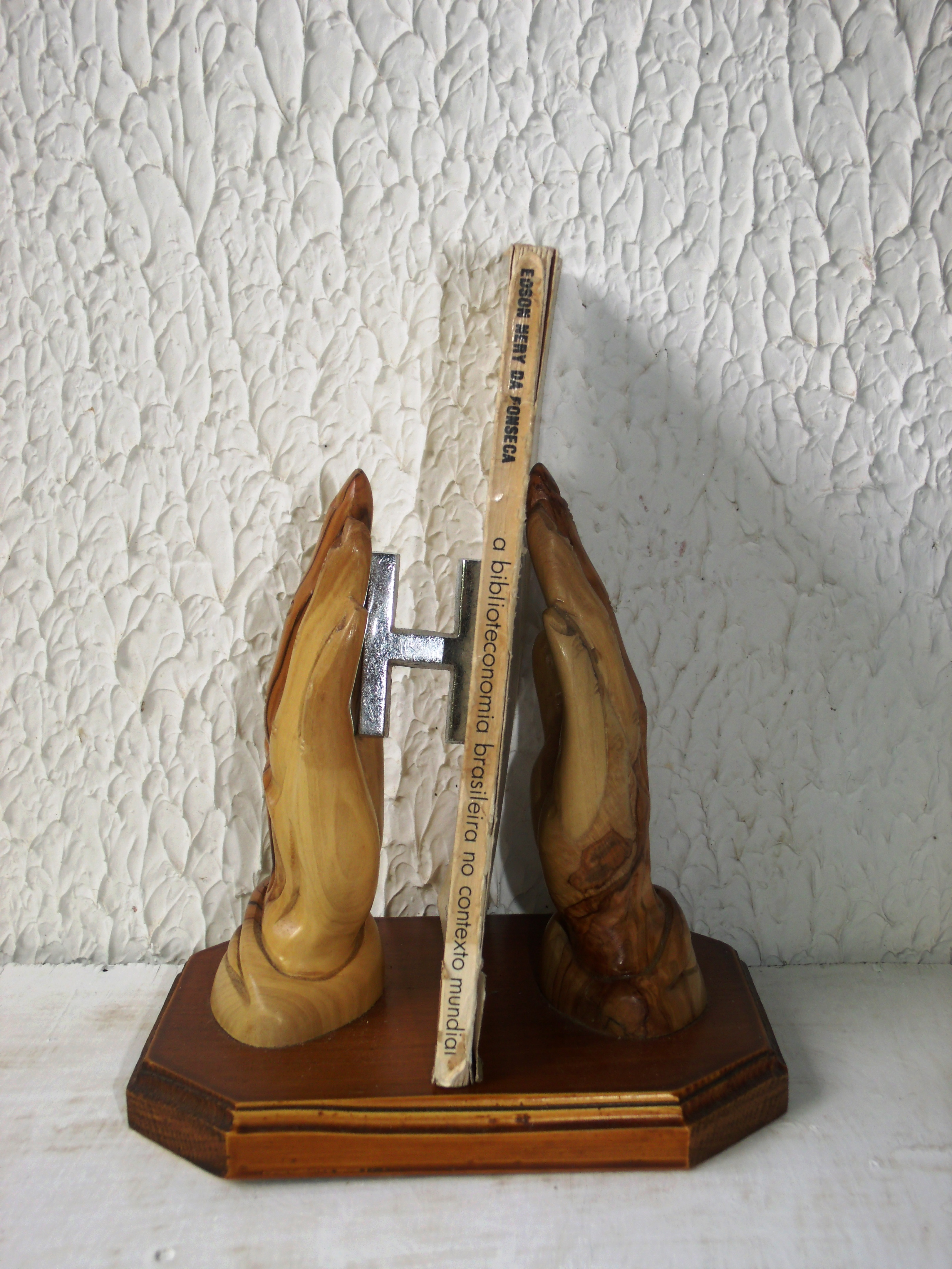 Exposição com a obra, A Biblioteconomia brasileira no contexto mundial, de Edson Nery da Fonseca. Editada em 1979 pelo Instituto Nacional do Livro.